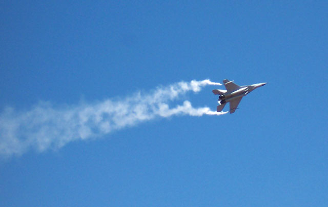 no original description